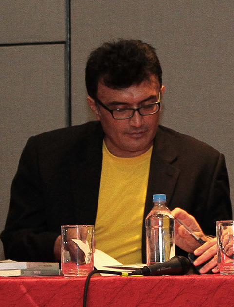 Quito 26 de nov (Andes) .- Juan Villoro en el homenaje a Miguel Donoso Pareja. Con los invitados, Paúl Puma, Luis Carlos Musso y Abdón Ubidia. Foto: Carlos Rodríguez/Andes JUAN VILLORO CCE Quito 26 de nov (Andes) .- Juan Villoro en el homenaje a Miguel Donoso Pareja. Con los invitados, Paúl Puma, Luis Carlos Musso y Abdón Ubidia. Foto: Carlos Rodríguez/Andes